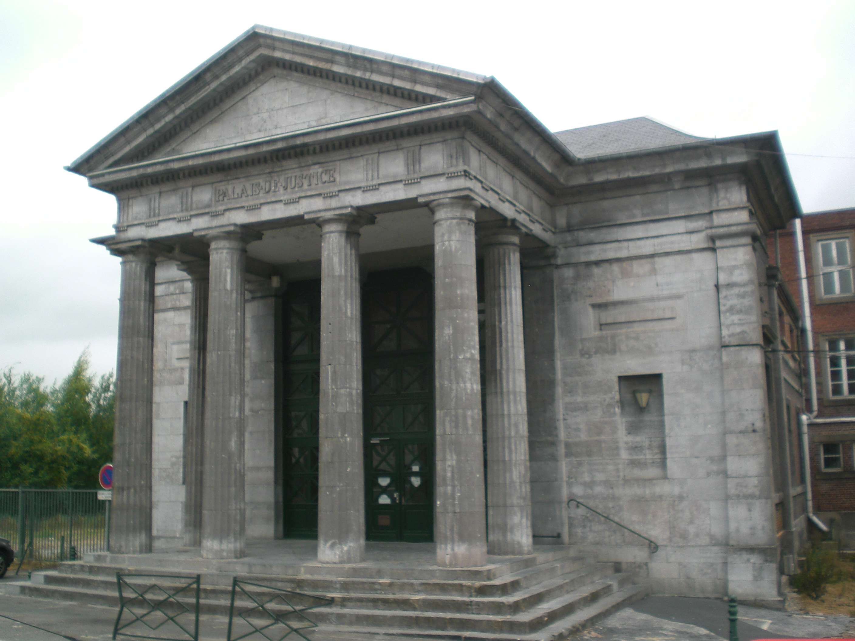 ancien palais de justice d'avesnes sur helpe nord france